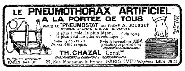 Publicité pour l'appareil médical appelé pneumostat